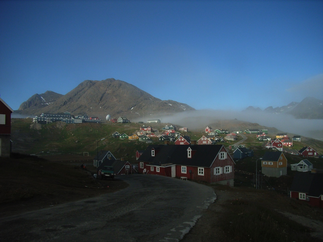 Tasiilaq – Blick zum Sømandsfjeldet (679 m)